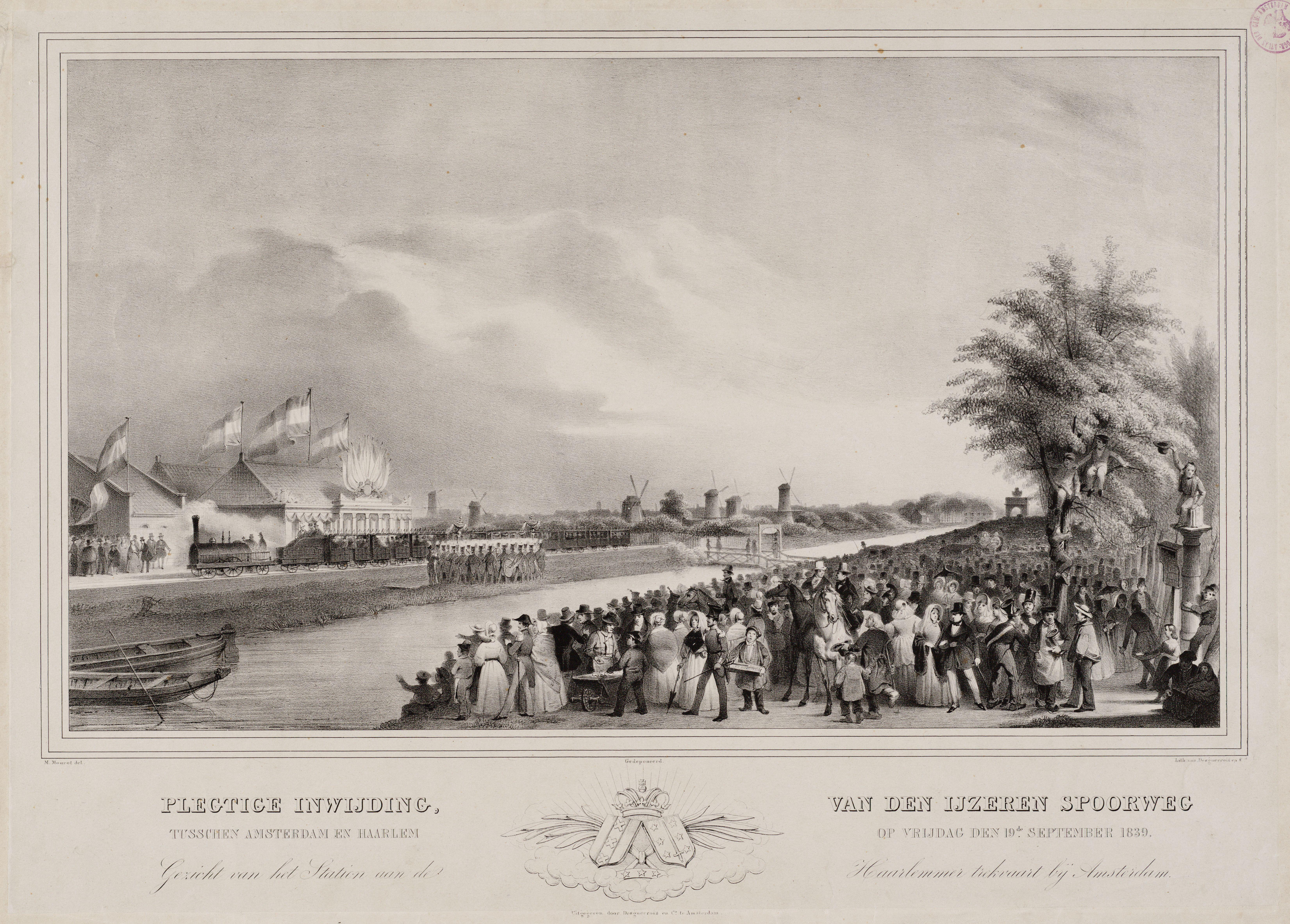 Inwijding van station d'Eenhonderd Roe bij Amsterdam, vrijdag 19 september 1839. Prent. 410 × 675 mm.